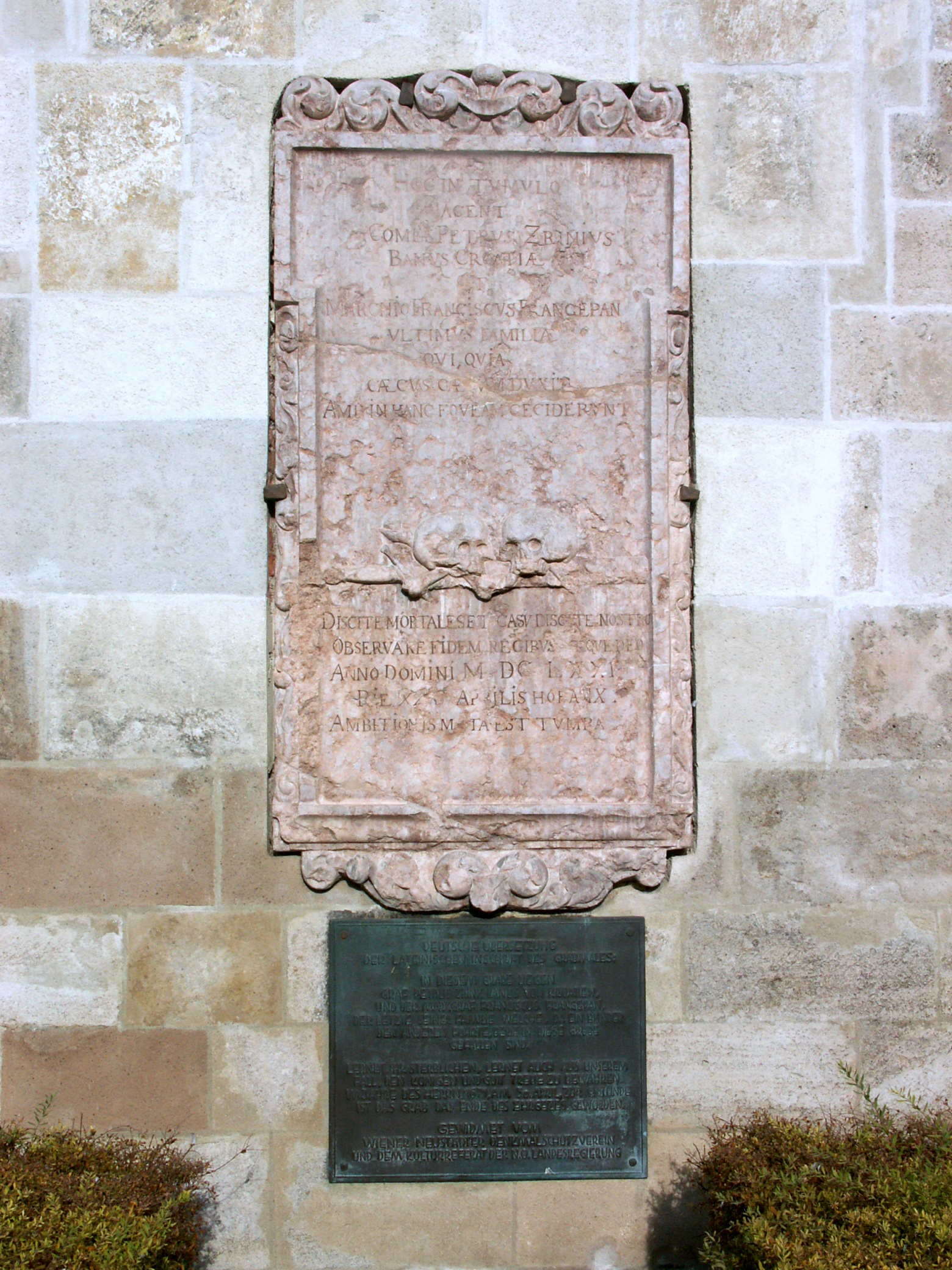 A bécsújhelyi (Wiener Neustadt) dóm falán Zrínyi Péter és Frangepán emléktábla